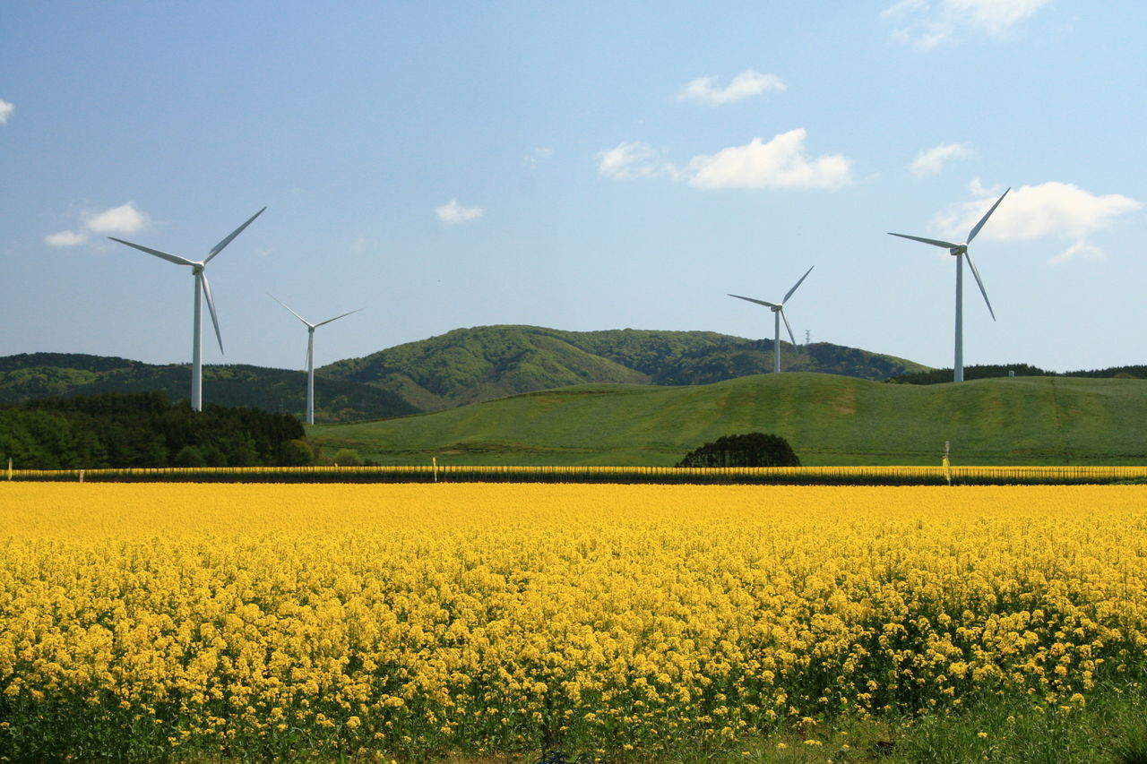 大豆田ウィンドファーム